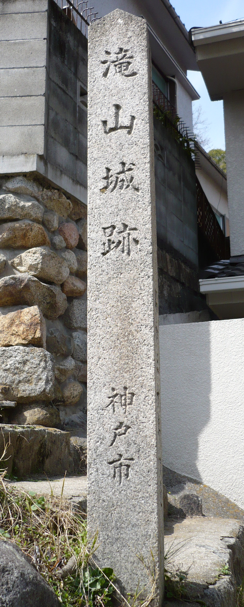 滝山城登山口案内石碑